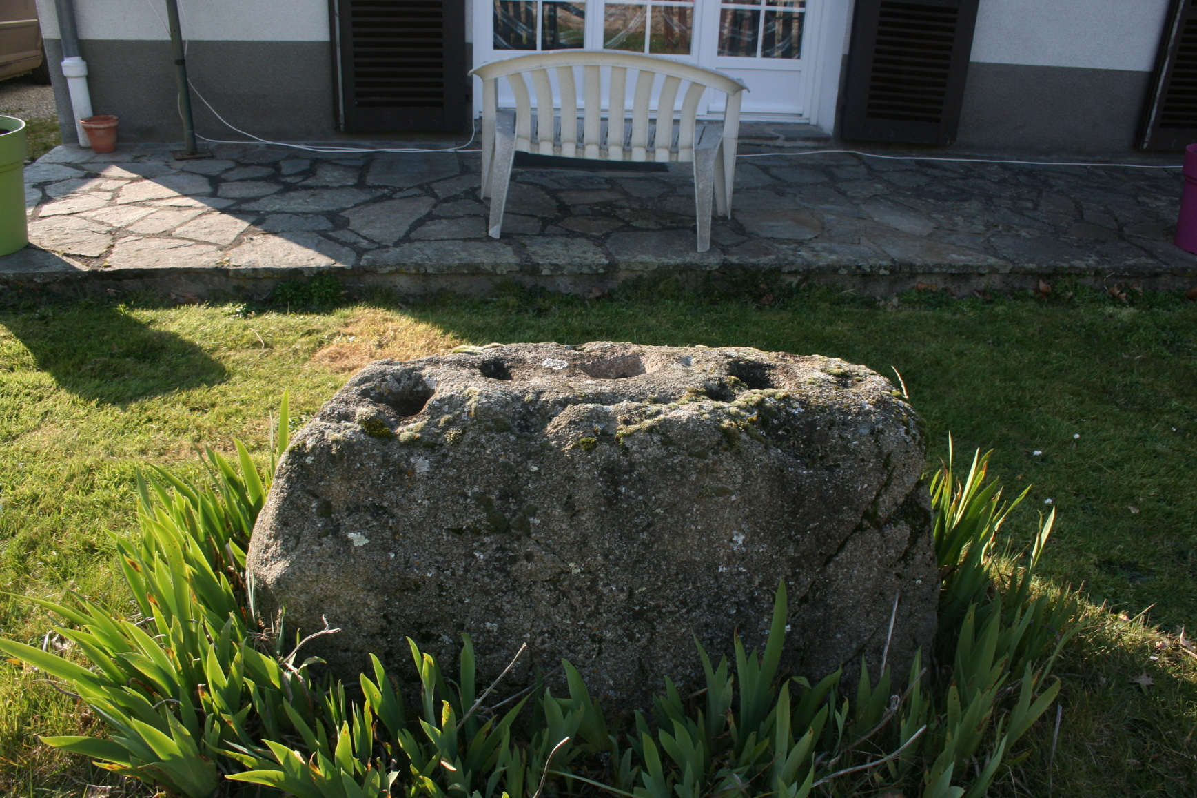 Bloc de granit isolé,dont la surface est parsemée de cupules plus ou moins remaniées.